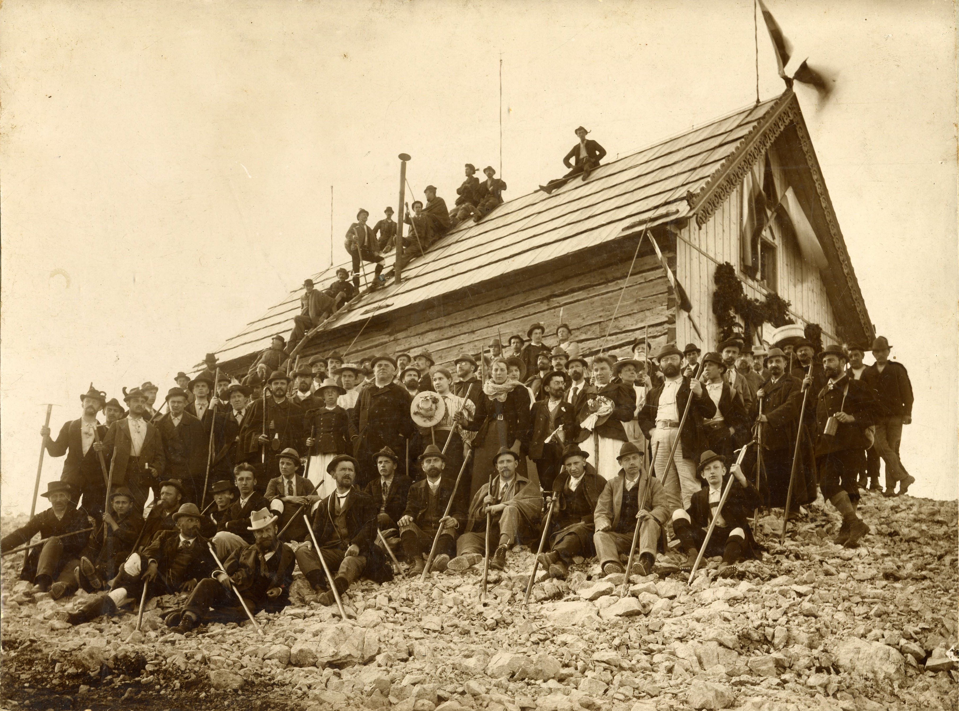 Otvoritev Triglavske koče leta 1896